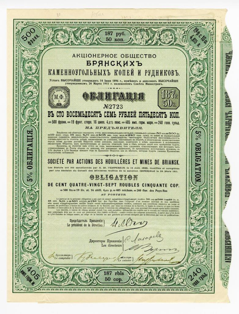 5 % Облигация в 187 руб. 50 коп. на предъявителя Акционерного общества Брянских каменноугольных копей и рудников.